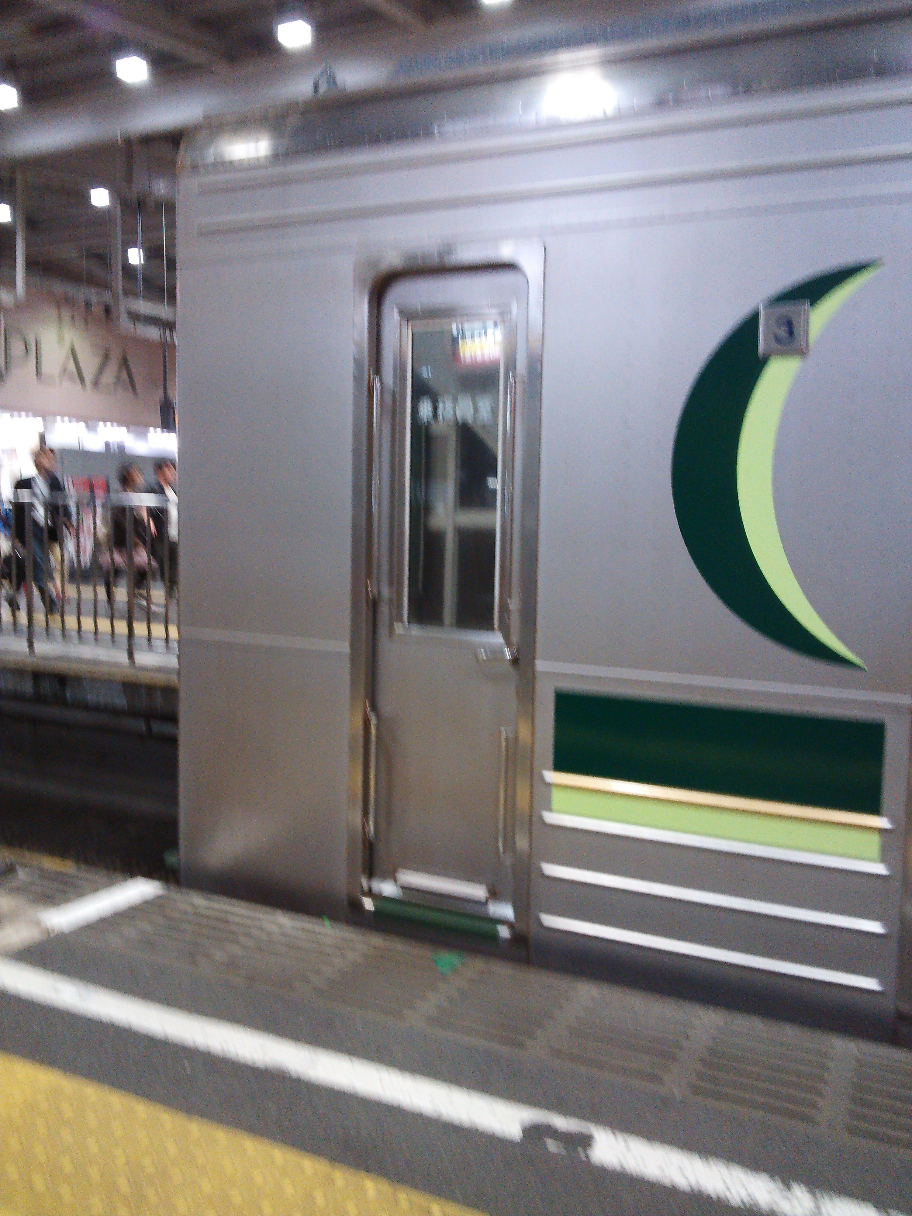 これは、東急1000系電車1500番台の、乗務員室部分の写真です。